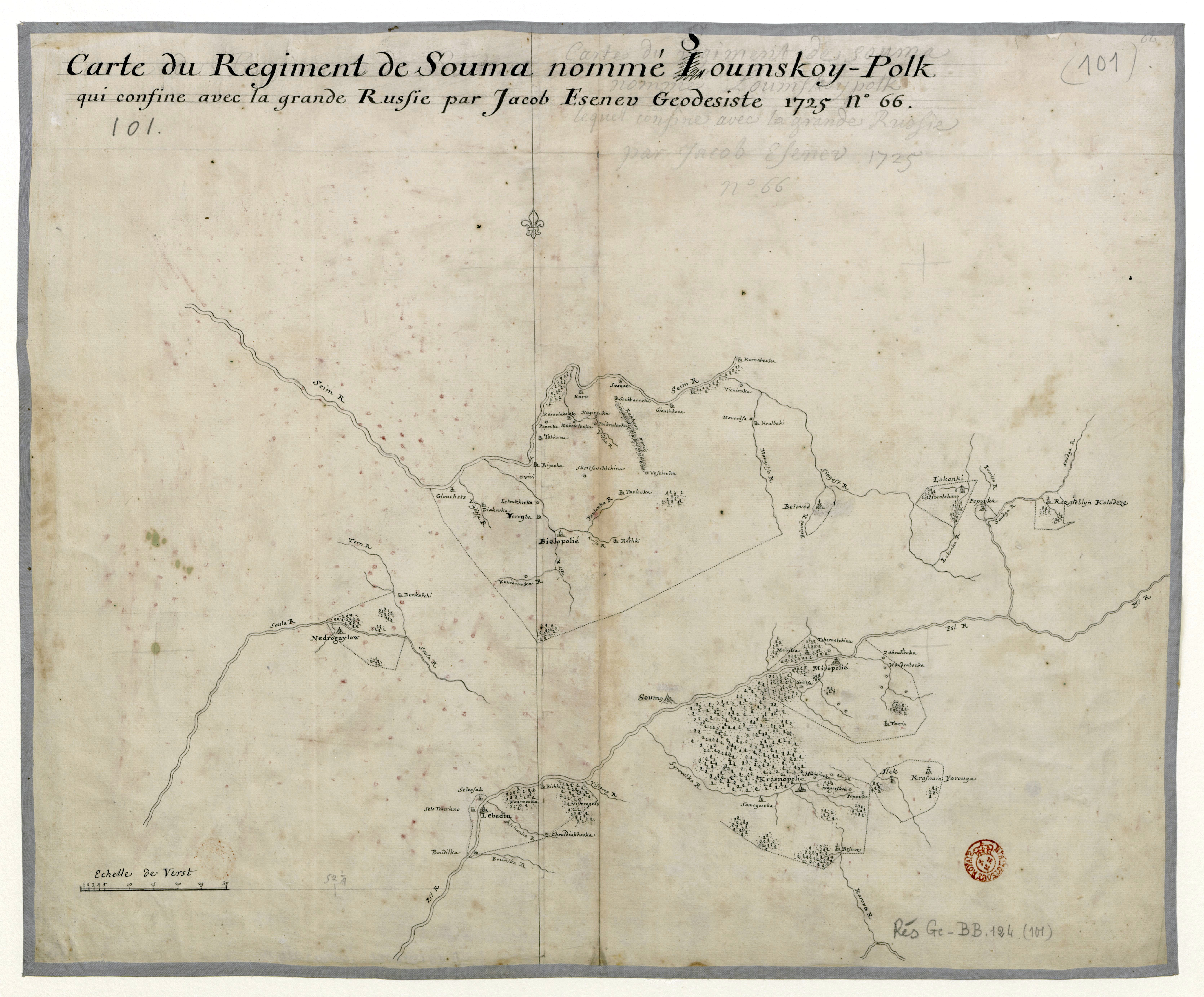 Карта земель Сумского слободского казацкого полка, составленная в 1725 году геодезистом Яковом Есеневым